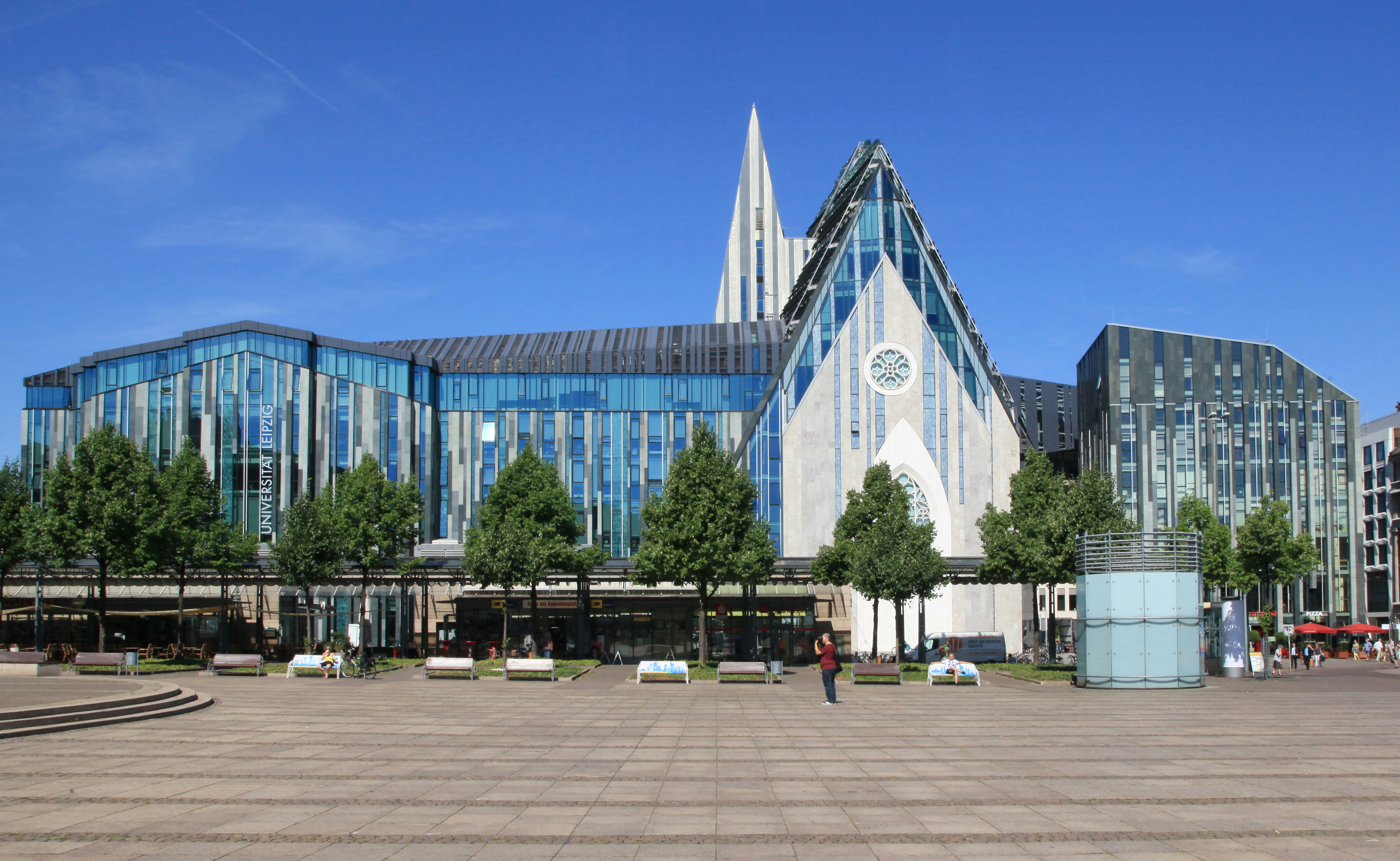 Neues Augusteum und Paulinum am Augustusplatz in Leipzig